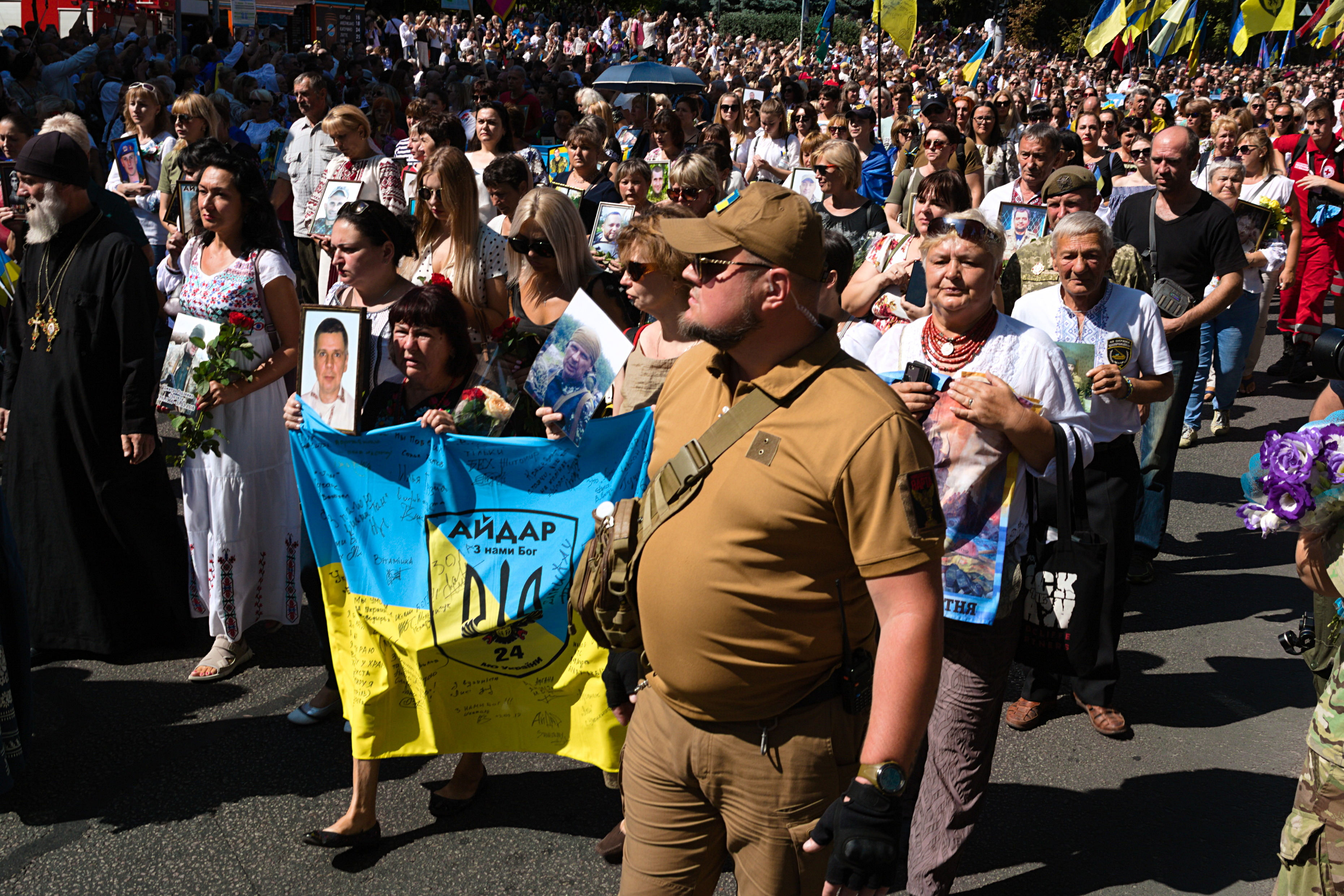 Родичі загиблих у війні на сході України з їхніми портретами.